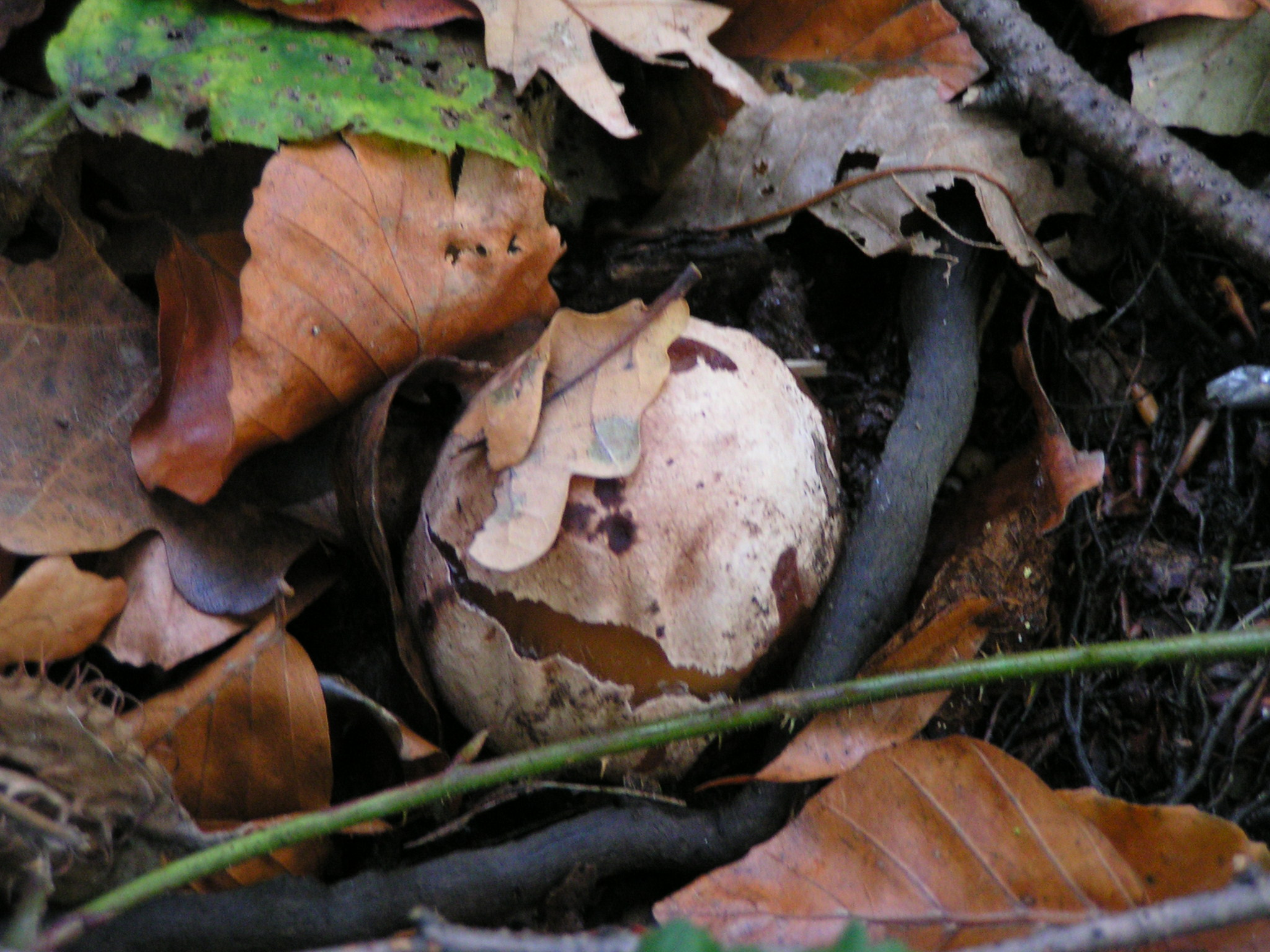 Duivelsei 29 oktober 2004